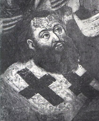 Портрет Петра Могили з цекви Спаса на Берестові, Київ